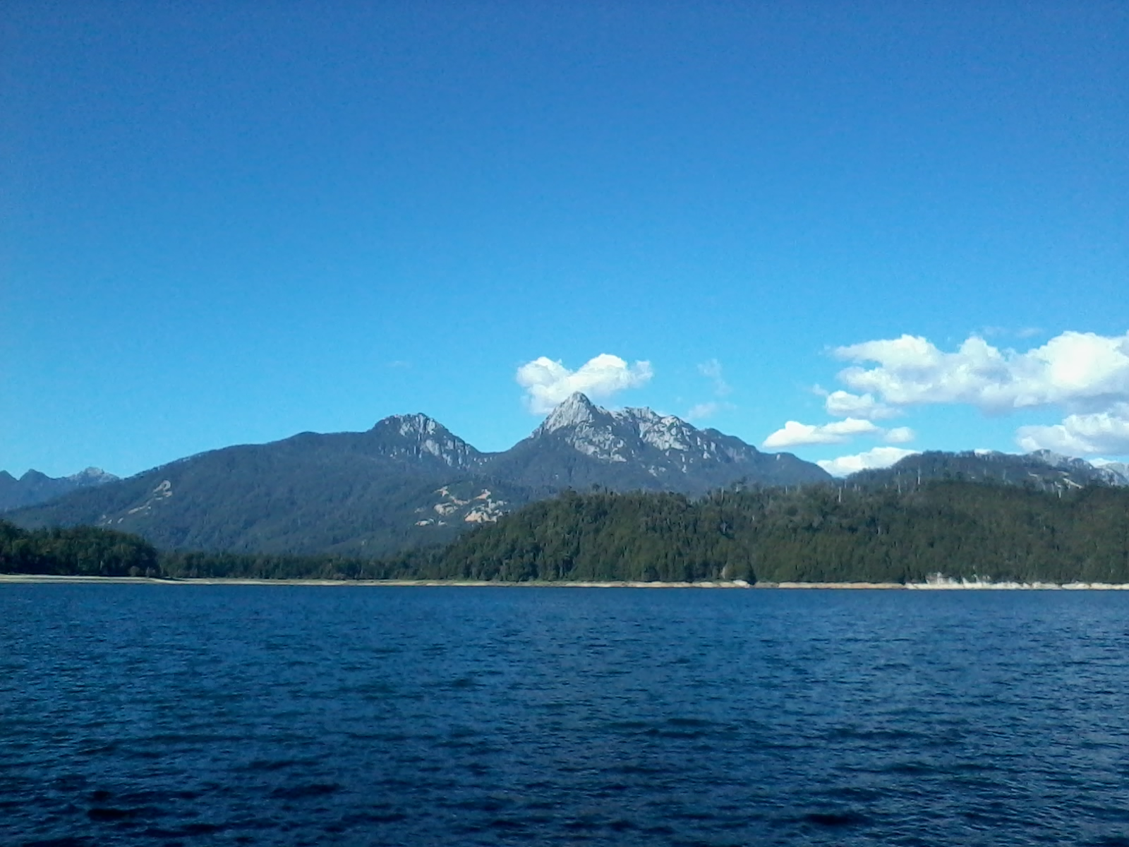 es un lago cordillerano, una belleza incomparable y donde se puede disfrutar de unas momentos inolvidable de pesca recreativa